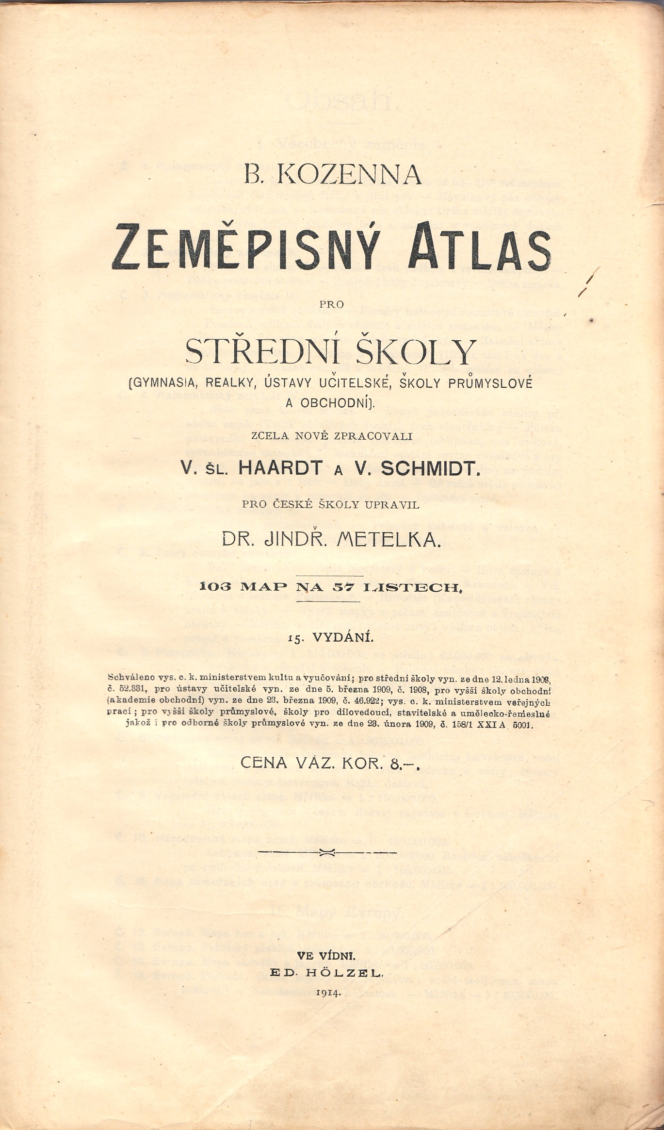 Blažeje Kozenna zeměpisný atlas pro střední školy (gymnasia, reálky, ústavy učitelské, školy průmyslové a obchodní). Zcela nově zpracovali V. šl. Haardt a V. Schmidt. Pro české školy upravil Dr. Jindř. Metelka. 15. vydání. Ve Vídni. Ed. Hölzel, 1914